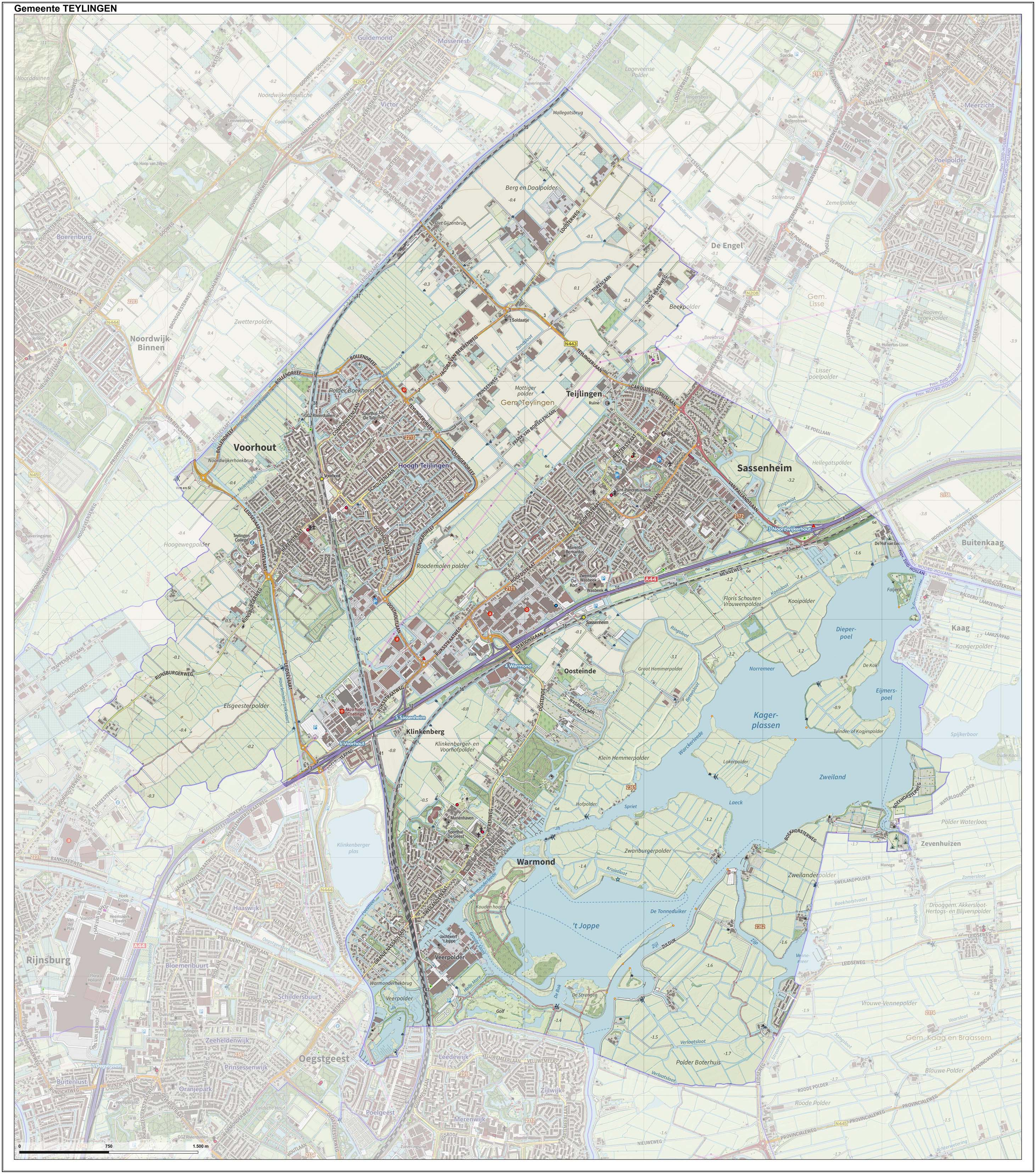 Topografische gemeentekaart. Resolutie: 400 pixels/km. Kaartbeeld samengesteld uit de open geodata van de Top10NL en Top25namen (Kadaster), Creative Commons-BY licentie. Gebouwvlakken uit open geodata BAG extract. Wegen uit de OpenStreetMap, OpenStreetMap community. Reliëfschaduw uit de Actuele Hoogtekaart AHN2. Samenstelling en kleurenschema: Jan-Willem van Aalst, met QGIS. Zie ook de Legenda.